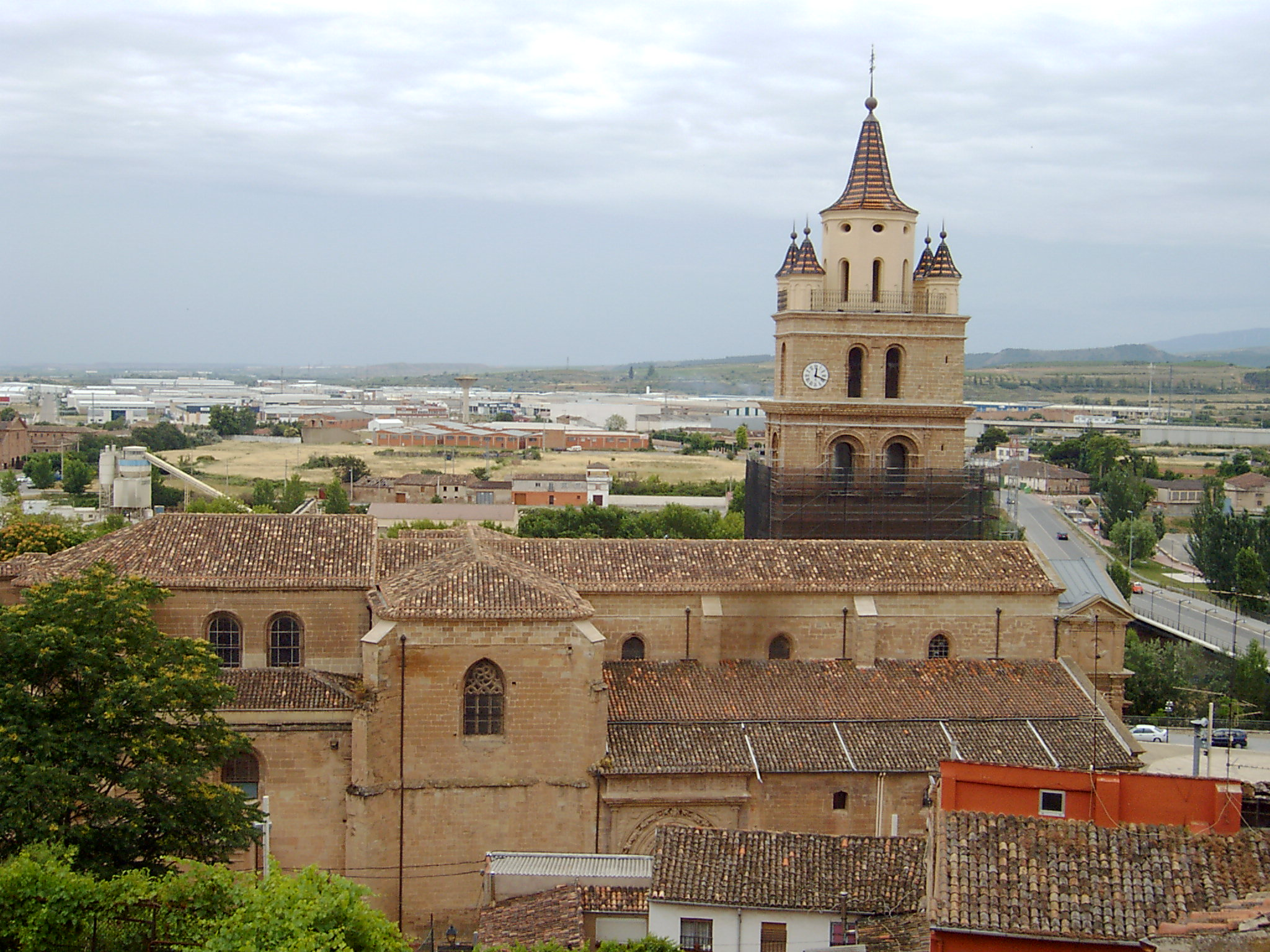 Calahorra katedrala